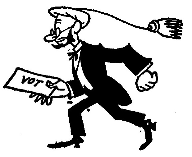 Caricatura anticarlina a L'Esquella de la Torratxa el 1914: [Alerta Poble. Tant si vá de "senyor ric",] com de "ridicol jaumista".